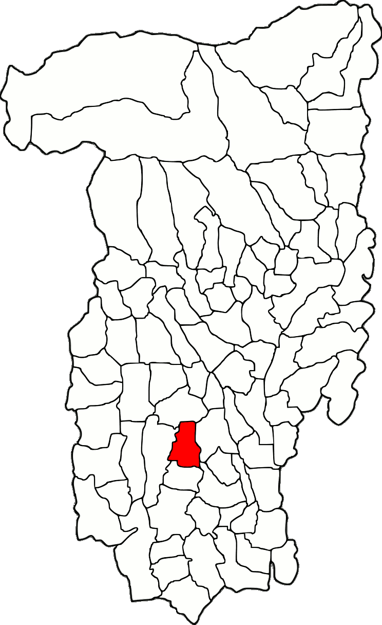 Lage der Gemeinde Stănești im Kreis Vâlcea (RO).